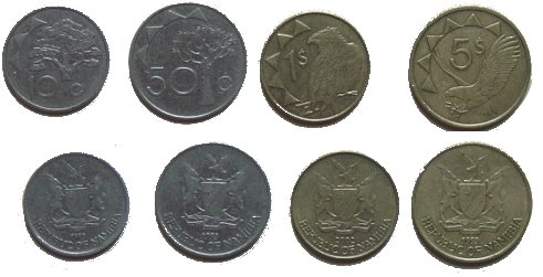 Namibische Münzen im Umlauf 2005 / Namibian coins current in 2005